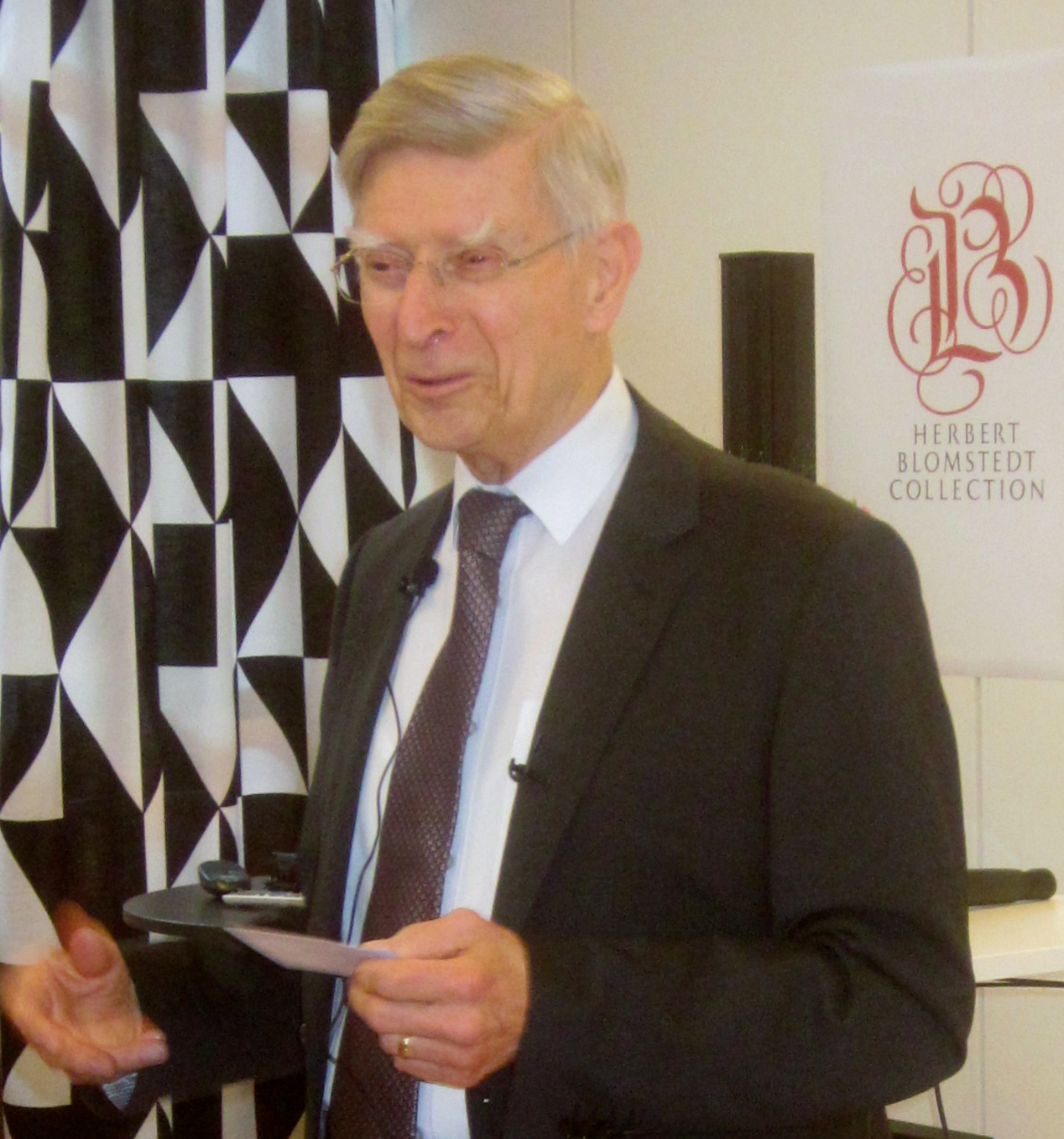 Herbert Blomstedt berättar om sitt livslånga boksamlande i samband med invigningen den 21 maj 2015 av Herbert Blomstedt Collection vid Göteborgs universitetsbibliotek.